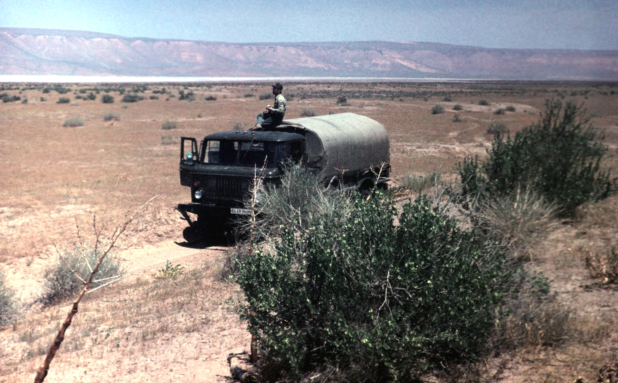 Экспедиция Института географии АН СССР на юг Туркменской ССР, (Ер-Ойлан-Дуз или Еройландуз).